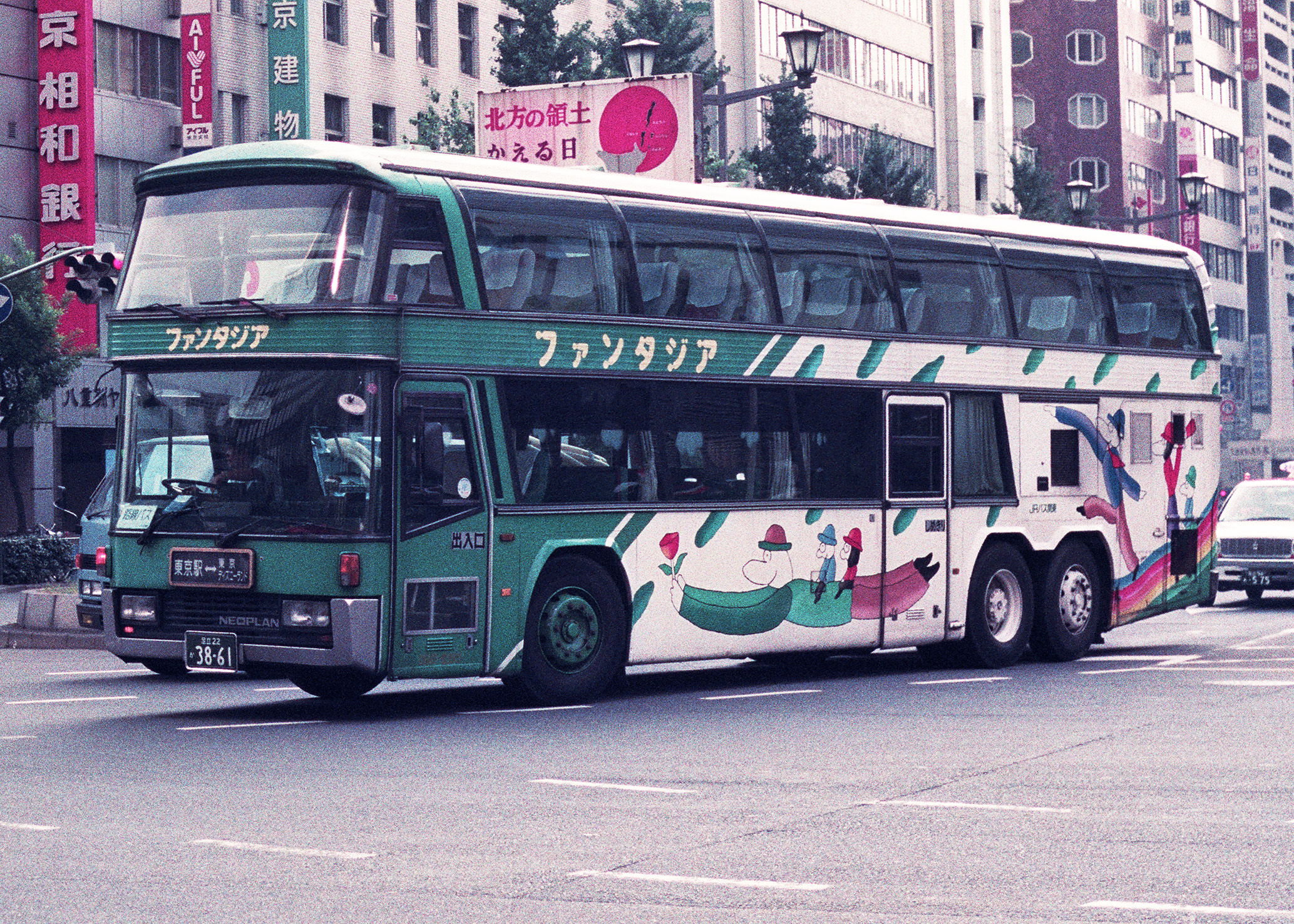 JRバス関東 ファンタジア ネオプラン スカイライナー N122/3.